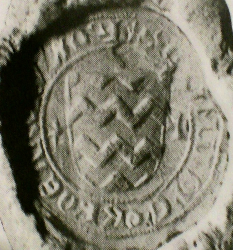 sello escudo heráldico